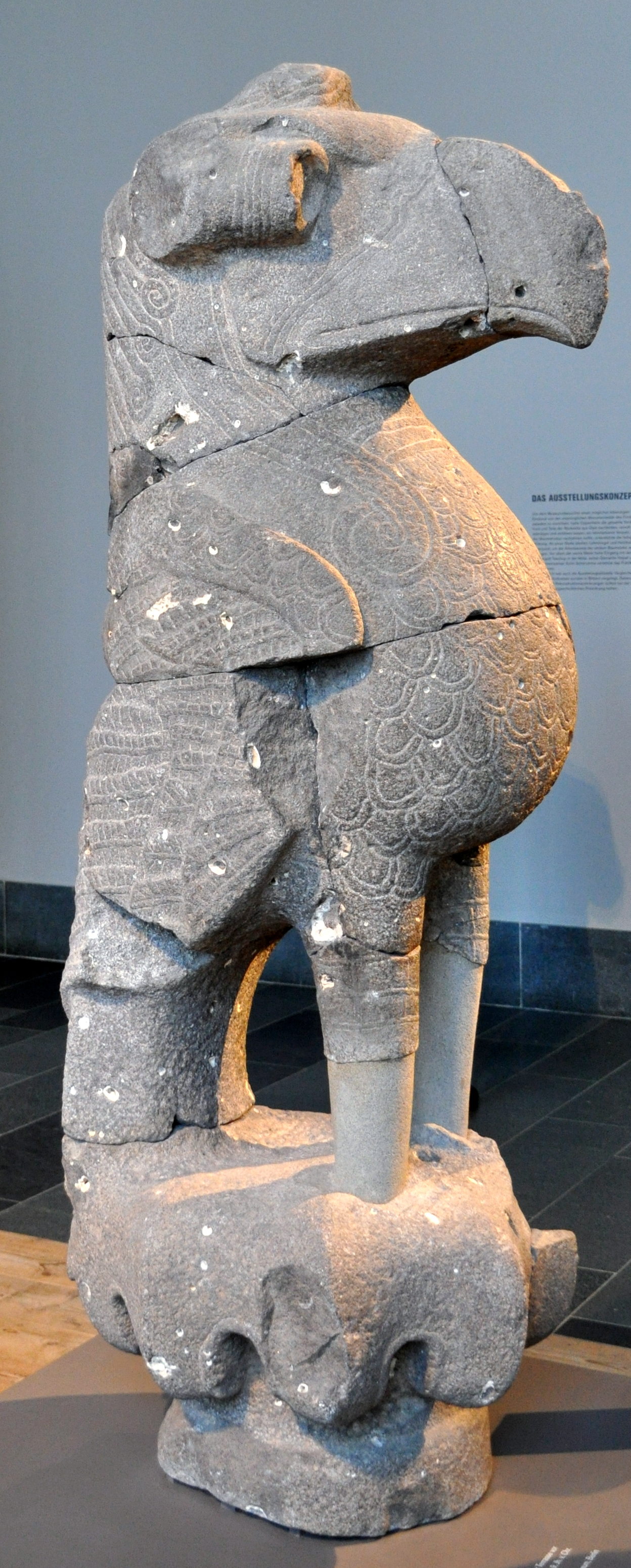 Skulptur eines Raubvogels (Seitenansicht), gefunden in Tell Halaf.